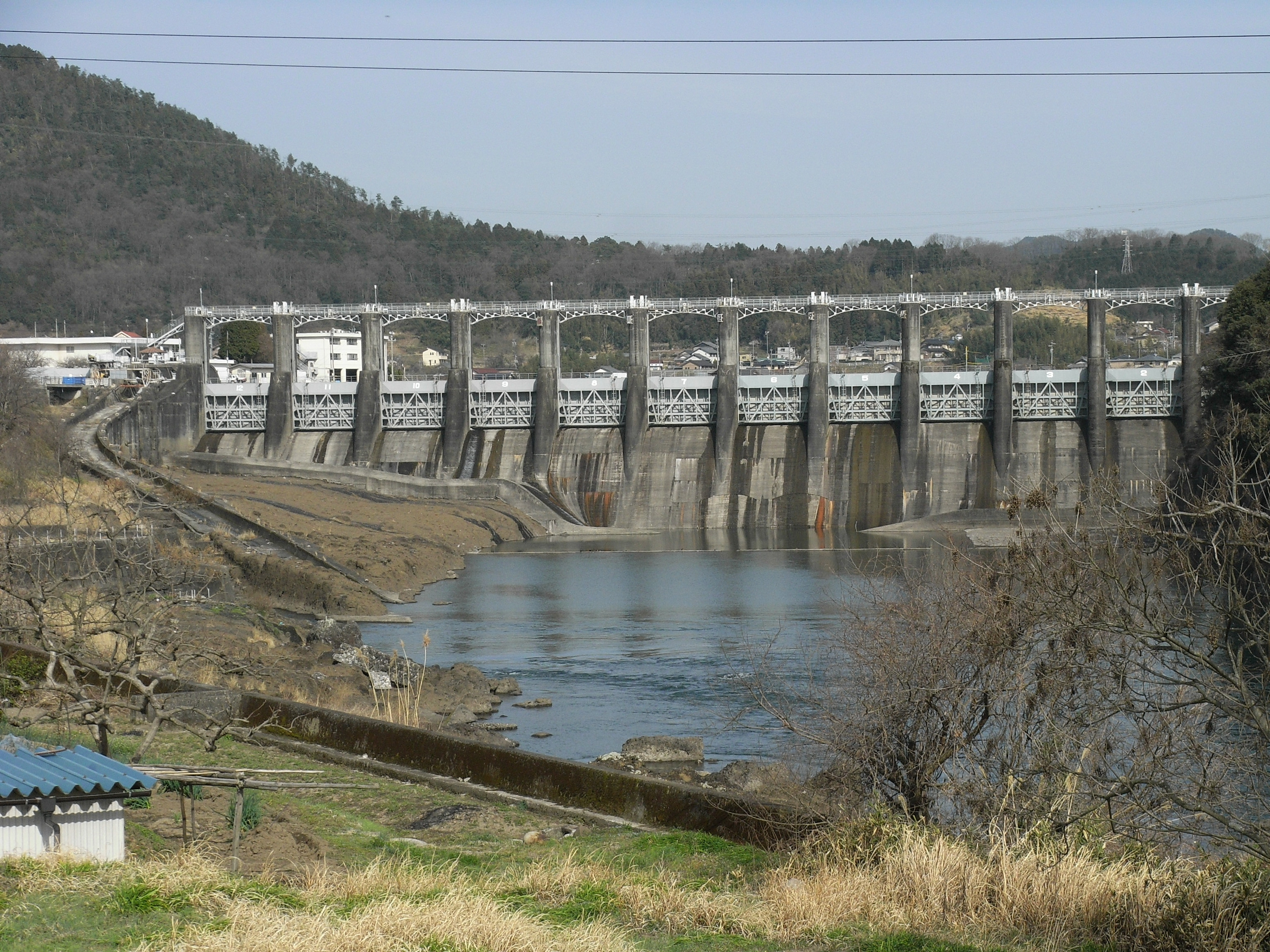 Dam